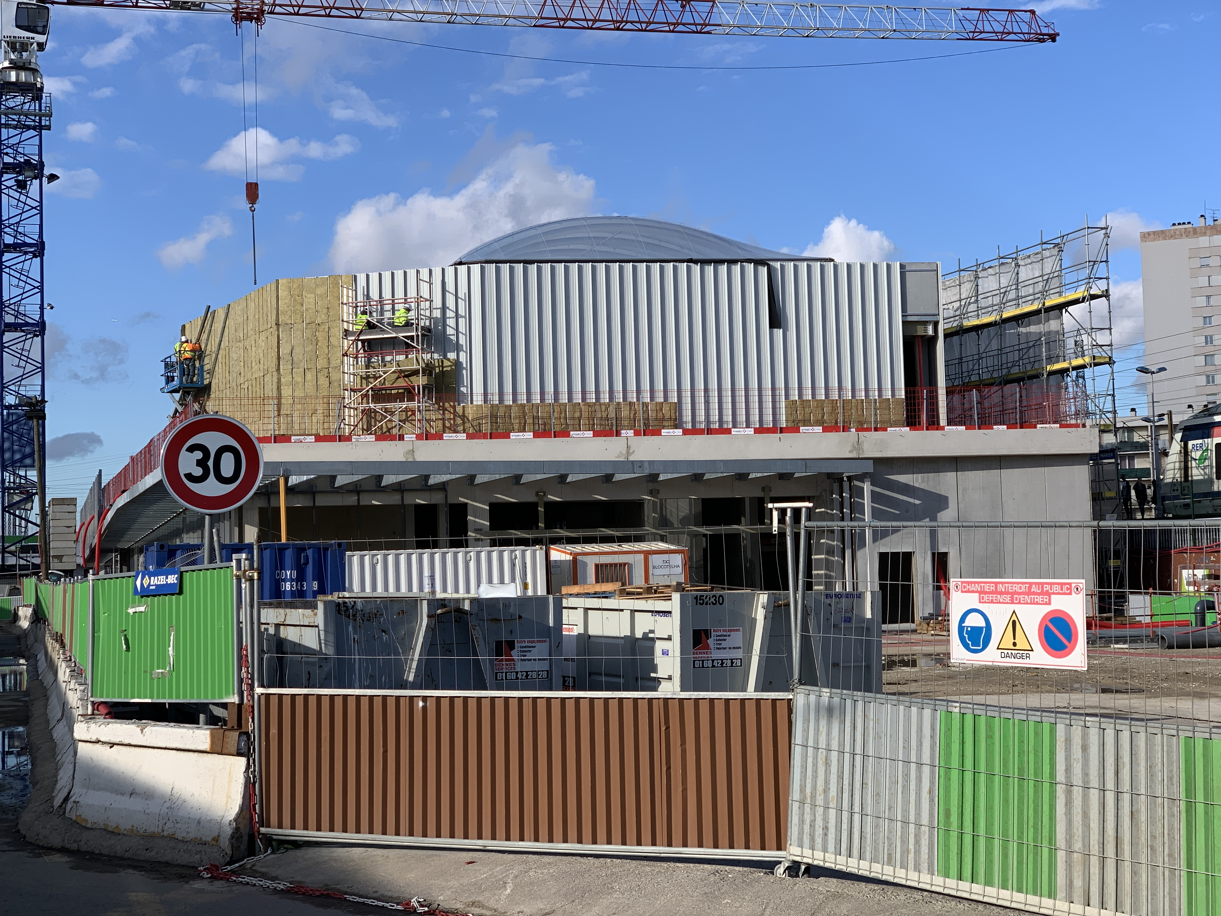 Chantier de la station de métro de ligne 11 à Rosny Bois Perrier, Rosny-sous-Bois.